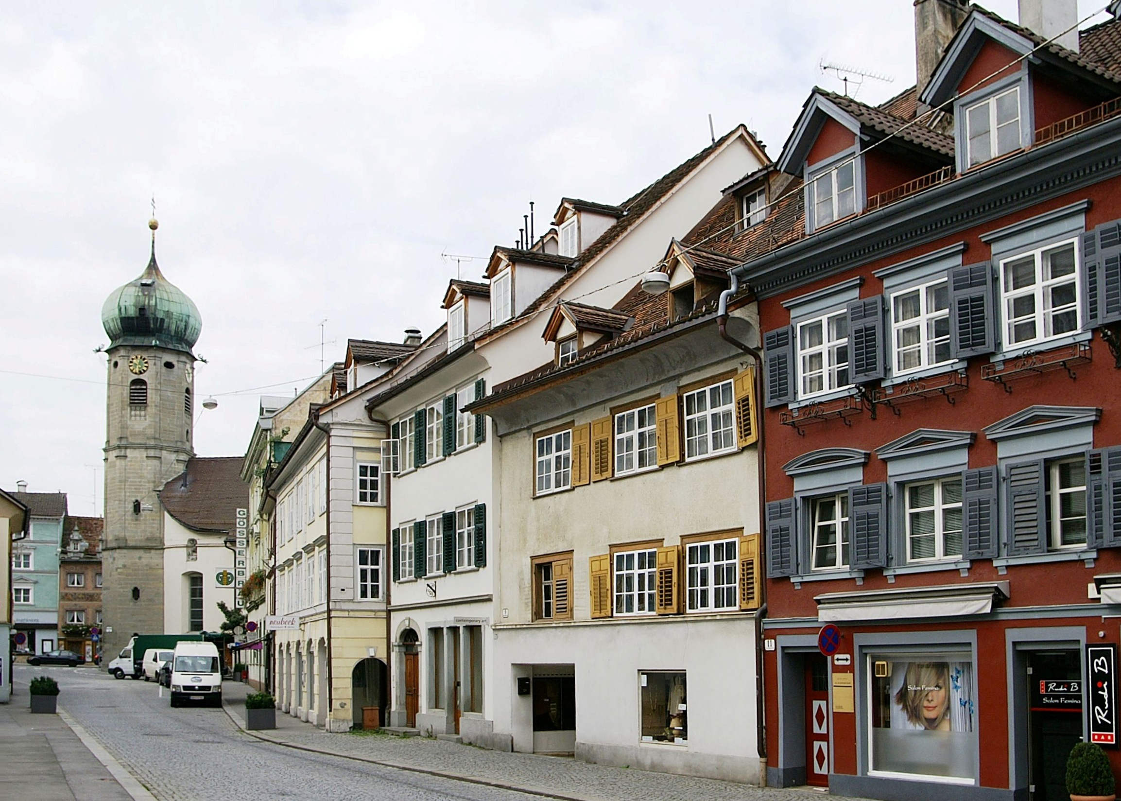 Häuserzeile in der Anton-Schneider-Strasse Nr.1,3,5,7,9,+11 mit Blickrichtung zur Rathausstrasse. Am Ende die Seekapelle in Bregenz.